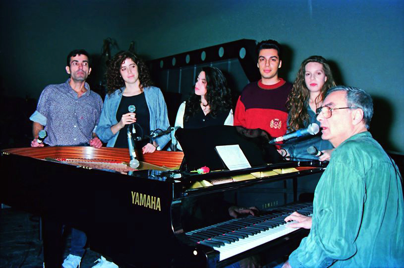 יאיר רוזנבלום עם הלהקה ביניהם בתו קרן (רביעית מימין) בביצוע שיר לשלום